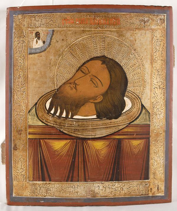 Head of Saint John the Baptist. ГЛАВА СВ ИОАННА ПРЕДТЕЧИ Икона XIX века. Поволжье.